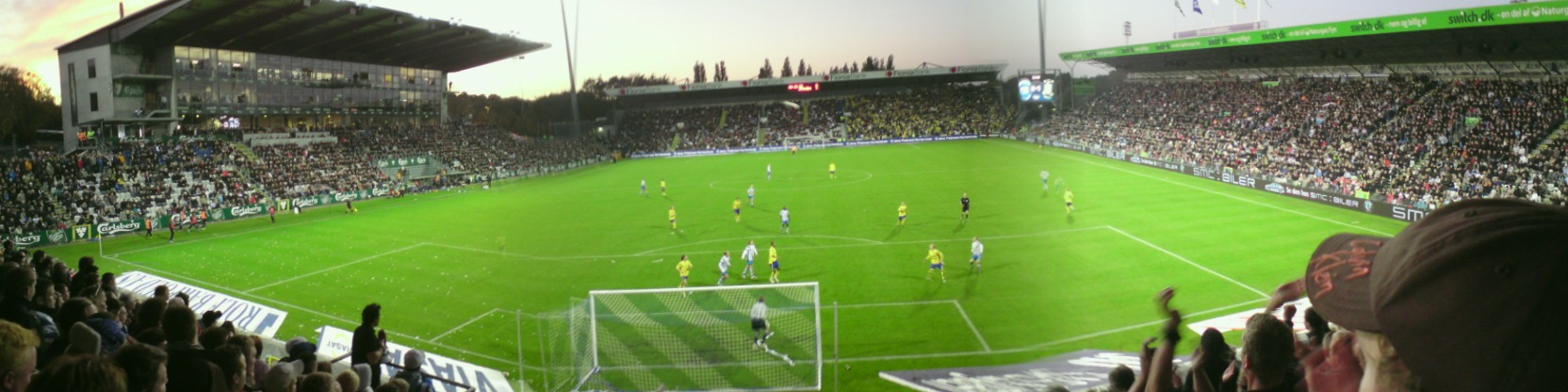 Panorama udsigt over Odense Stadion, set fra Fyens Stiftidende tribunen